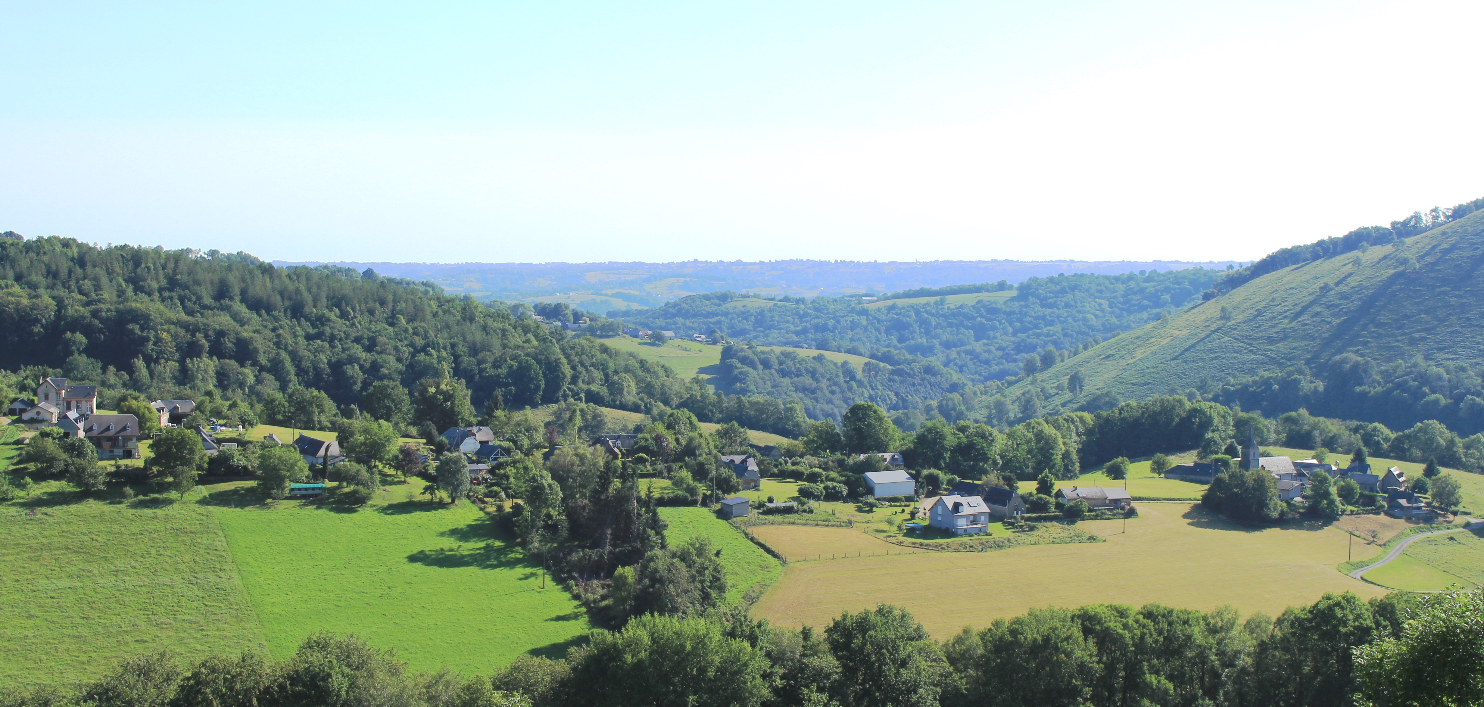 Marsas (Hautes-Pyrénées)